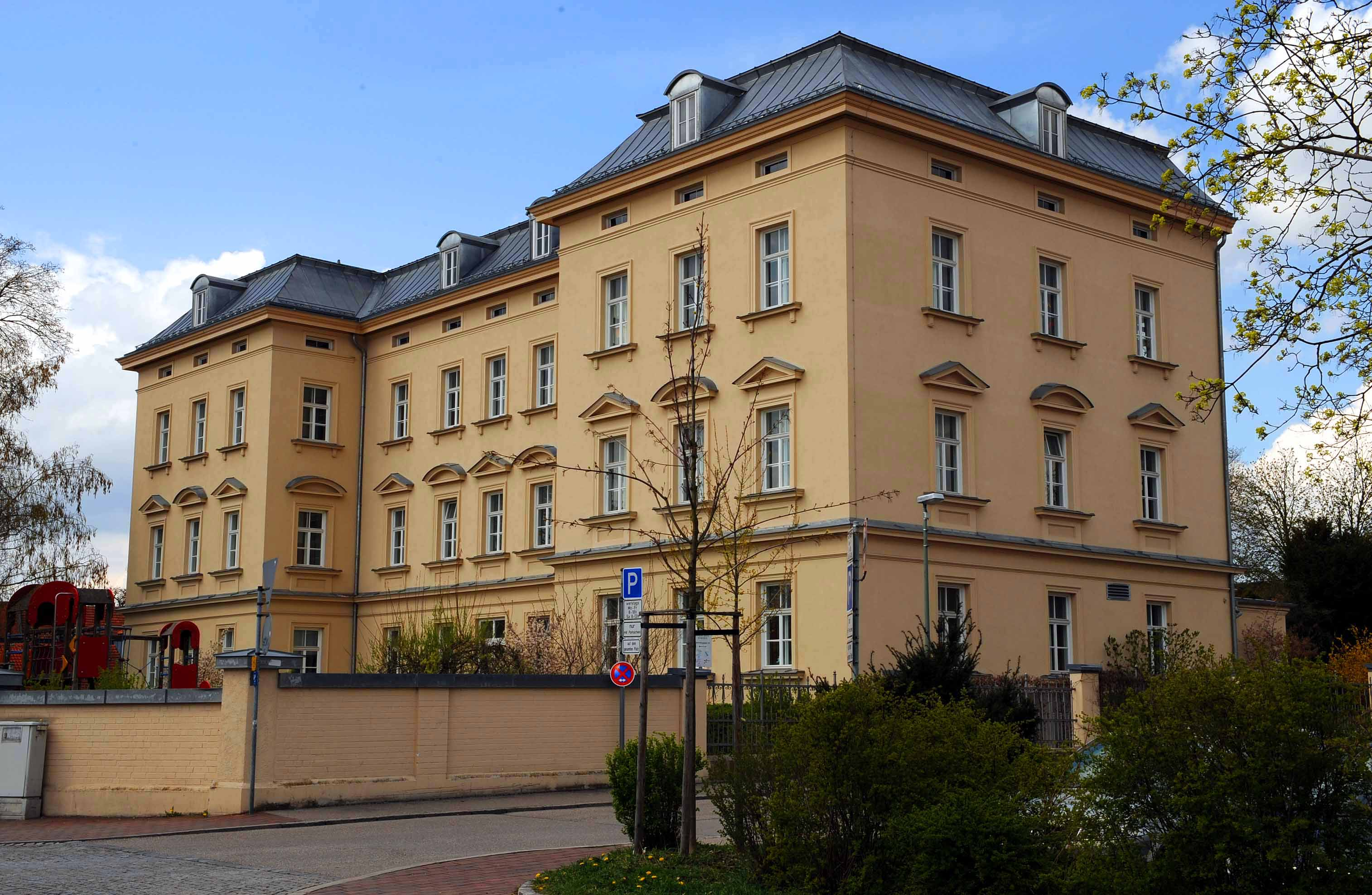 Das ehemalige Kinderheim St. Klara an der Kammergasse in Freising ist heute Heimat des Katholischen Kreisbildungswerks Freising